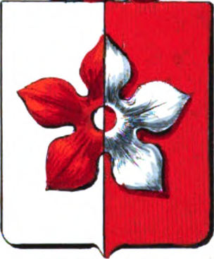 Armes de la famille de Fierlant. Blasonnement : "parti d'argent et gueule, à une quintefeuille boutonnée de l'un en l'autre."